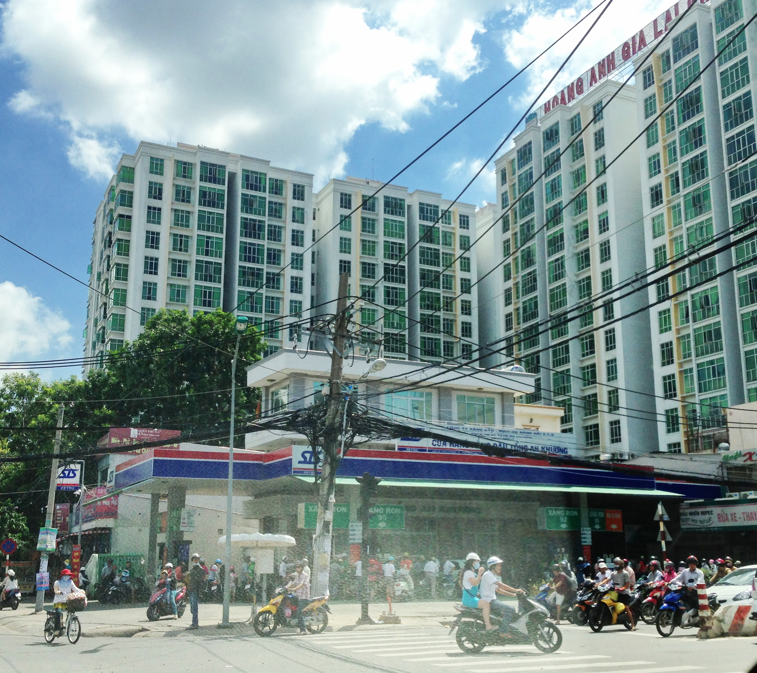 Chung Cu Hoang anh gia lai,nguyen thi thap, tan quy, quan 7, tphcmvn